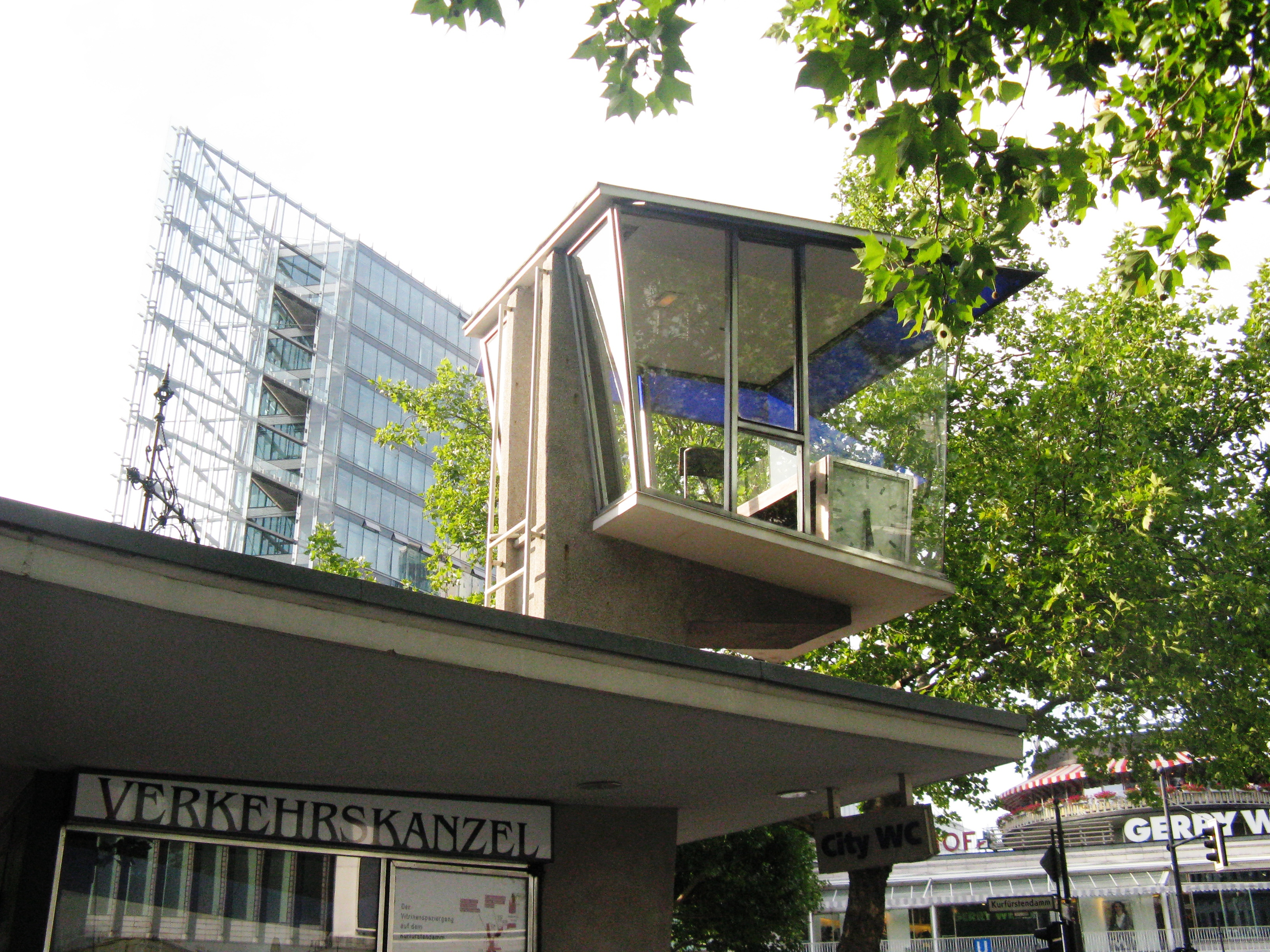 Verkehrskanzel, Joachimstaler Straße Ecke Kurfürstendamm, Berlin